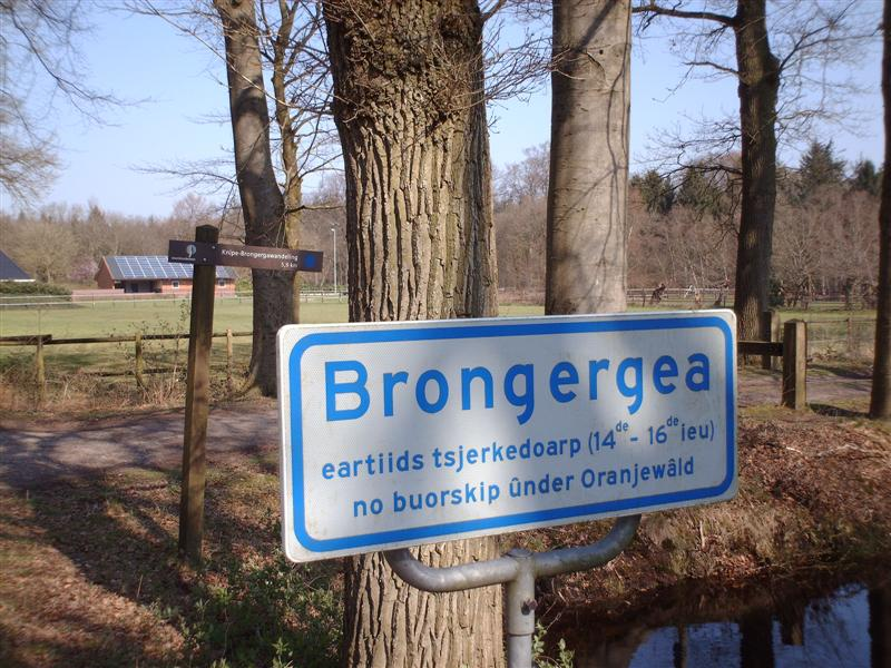 Brongerga